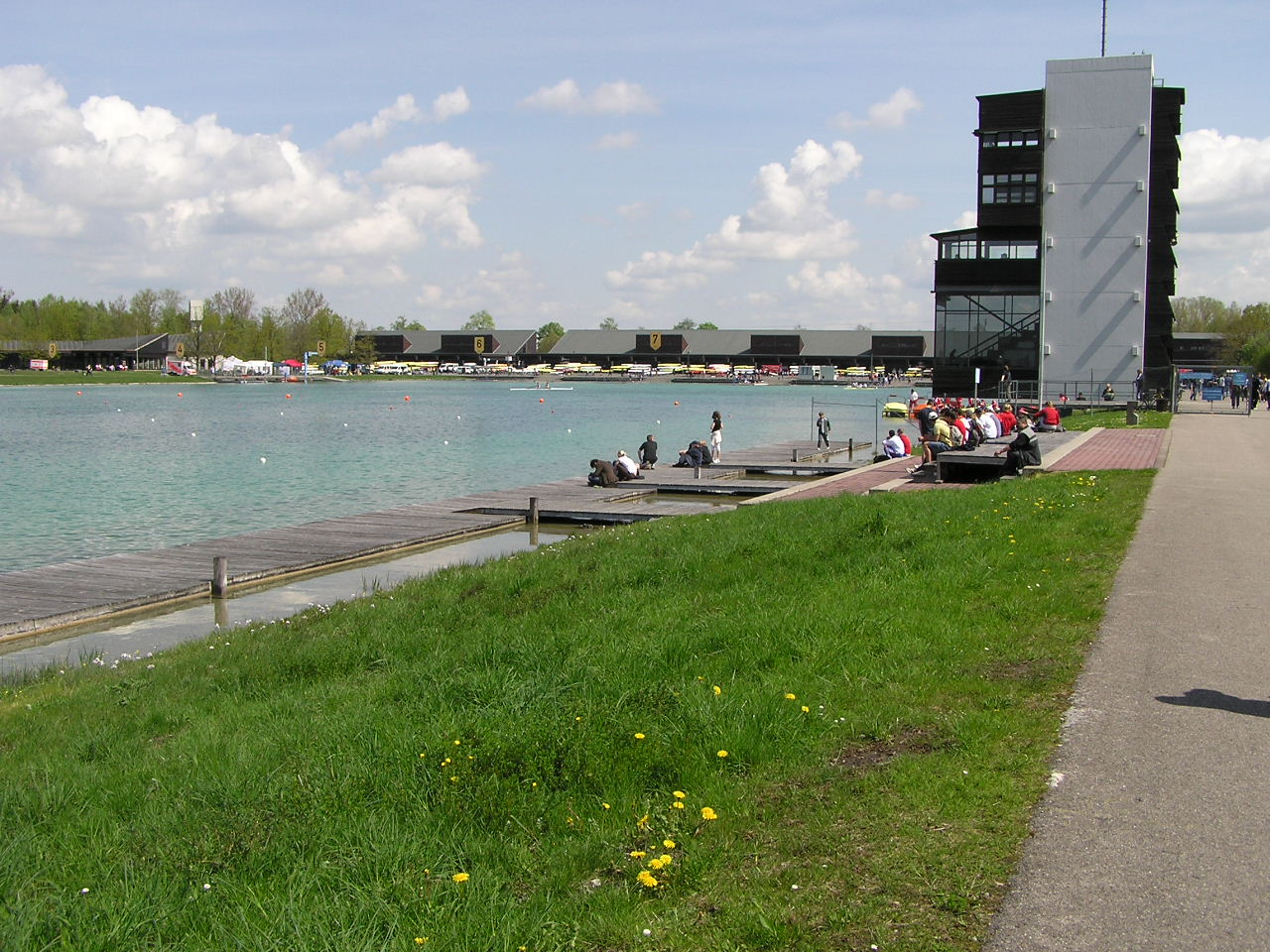 Zielturm der Regattastrecke Oberschleißheim, bei München